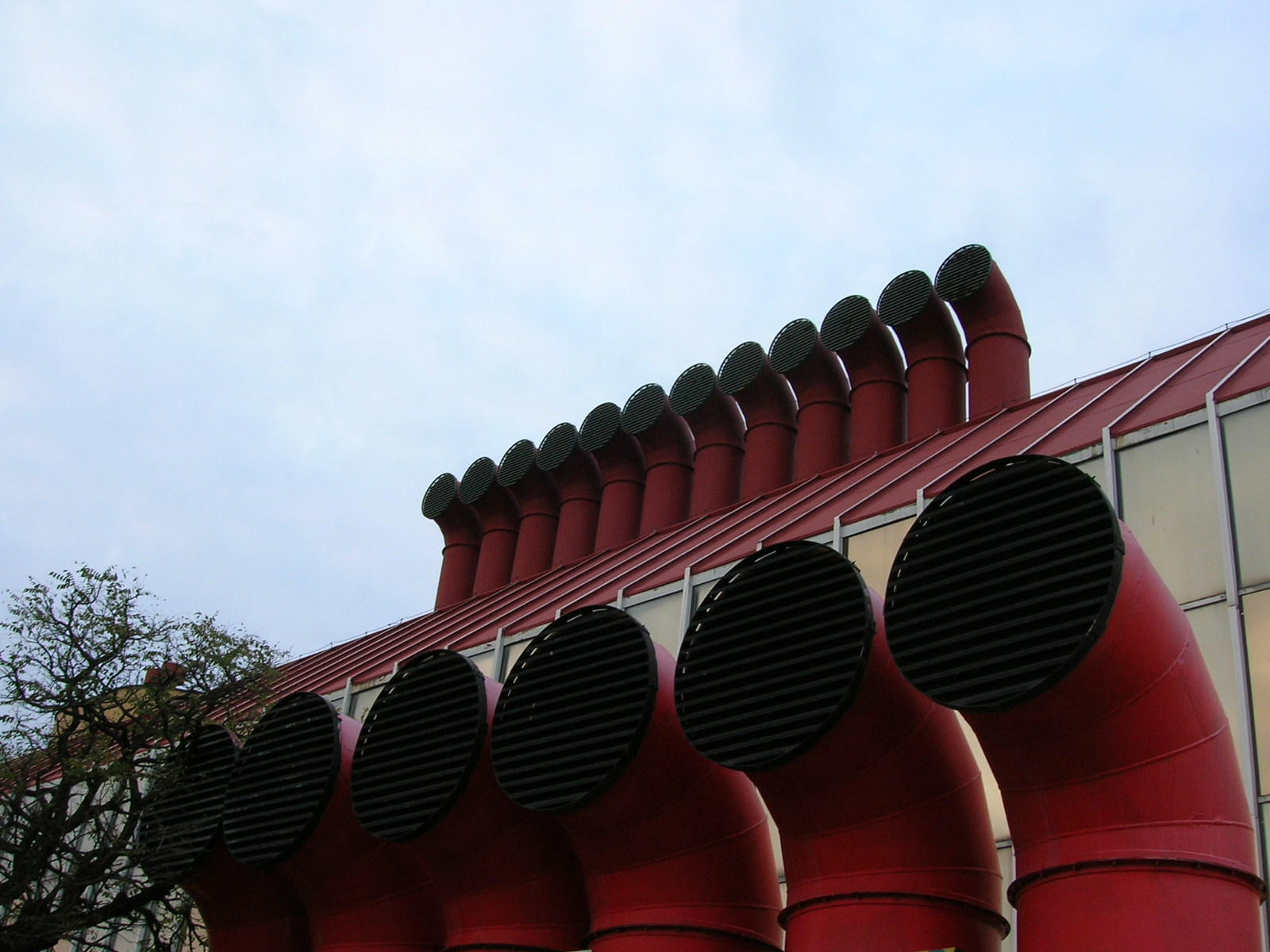 Designová potrubí na Nové Tržnici v Bratislavě, Slovensko